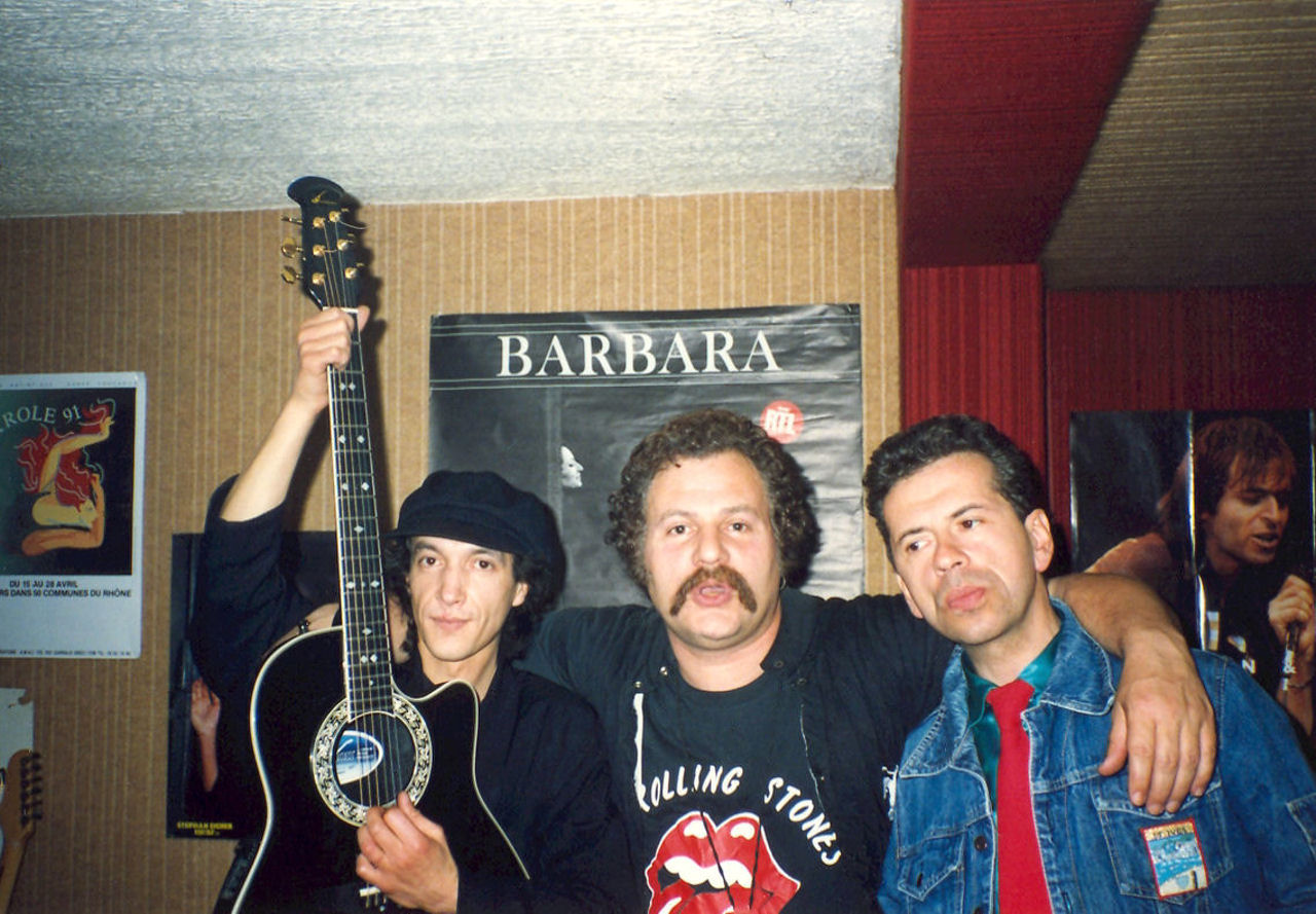 Yves MATRAT et Puce à Radio Arc-en-Ciel FM... Le 3 mai 1991, je consacre une émission entière de Quelque chose à dire à FACTORY, 3 heures de chanson française durant lesquelles le parcours du groupe sera mis en lumière, en illustration de la nouvelle carrière d'Yves en solo. Yves, qui a été hospitalisé peu avant, se montre grognon, il préfèrerait qu'on ne parle que de son avenir plutôt que du groupe défunt. (Historique de FACTORY : ).